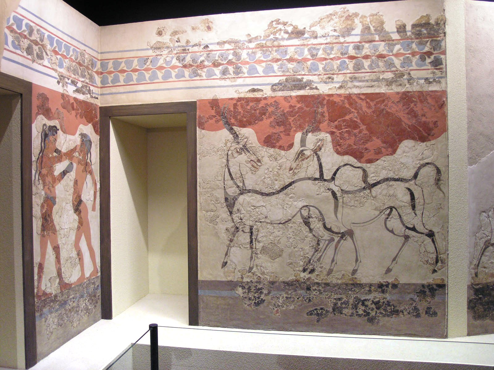 Fresques de la pièce B1 de l'édifice B à Akrotiri de Théra. Fresque des deux jeunes boxeurs, et fresque des antilopes. Musée archéologique national, Athènes.